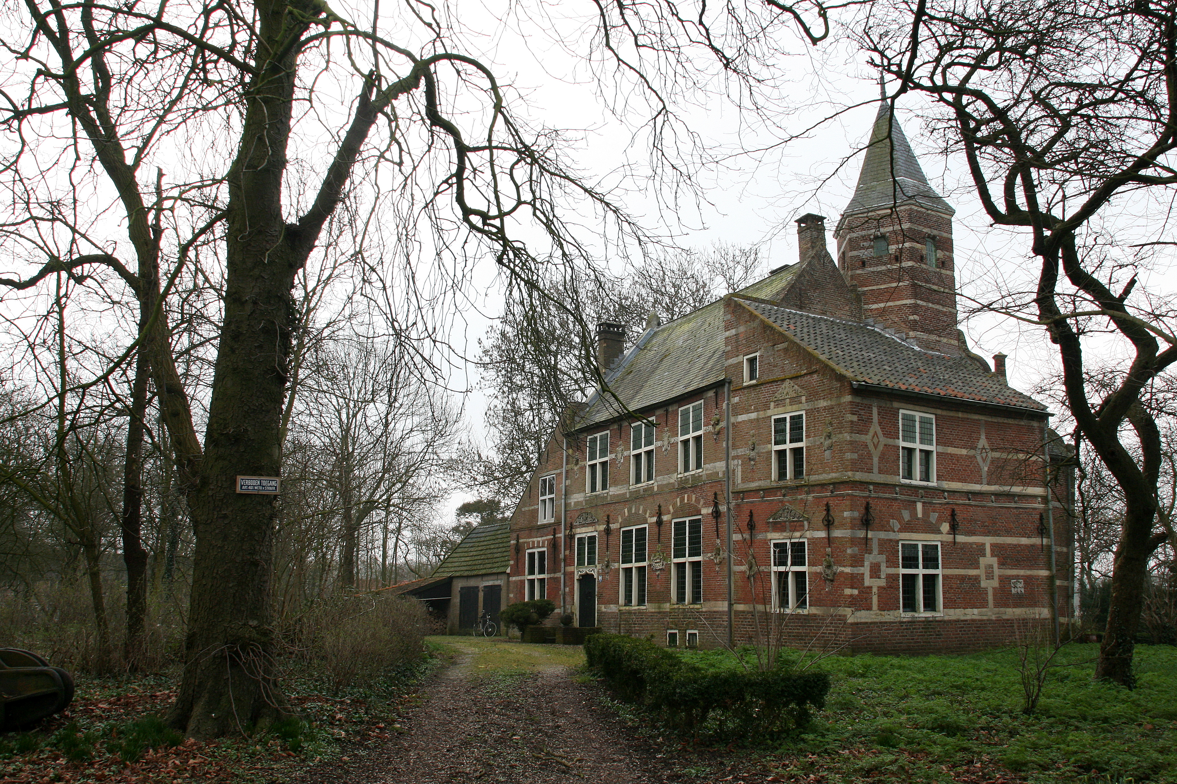 Schelluinen - Kerkweg 4 - Kasteel Schelluinen